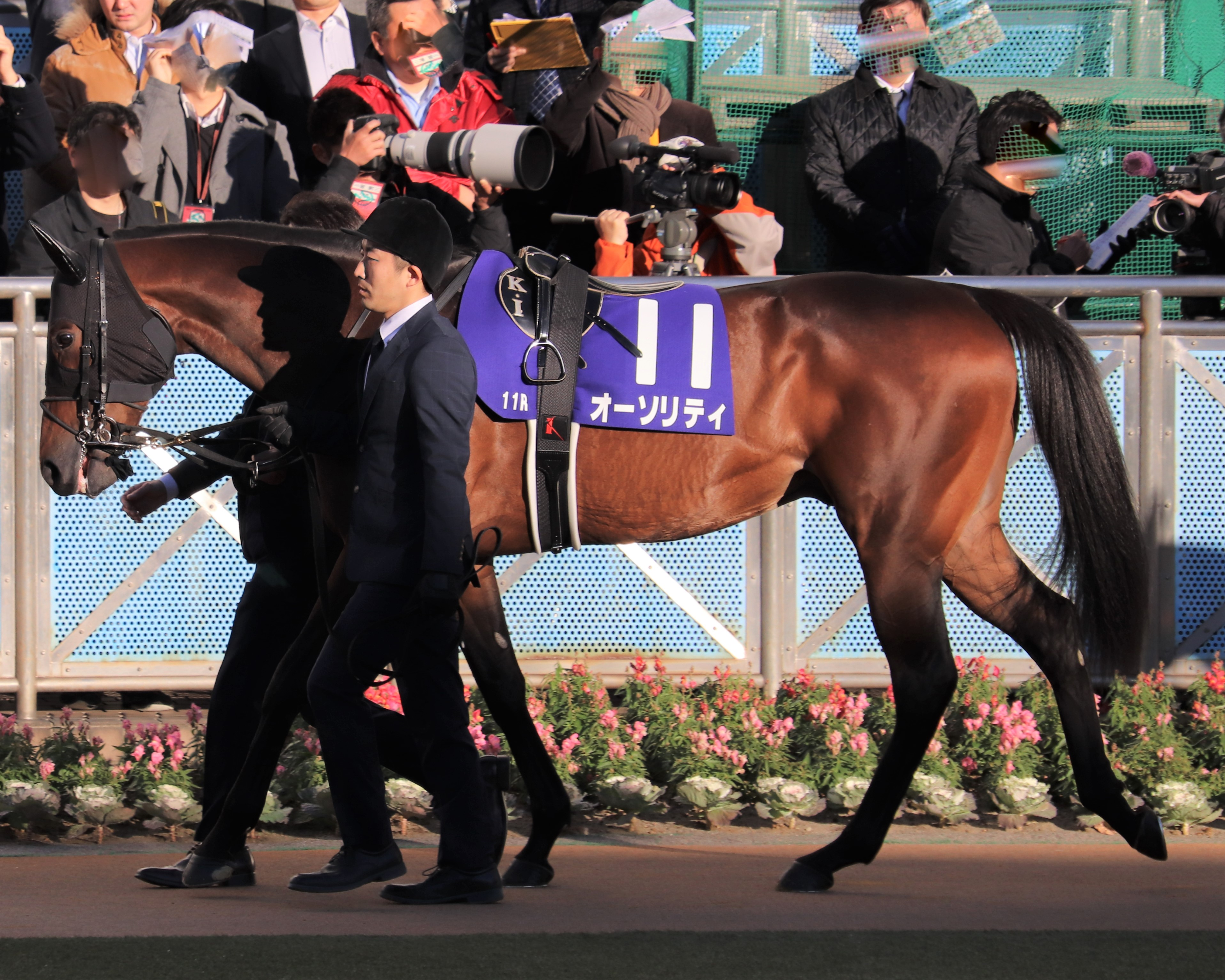 2019年のホープフルステークス、パドックのオーソリティ